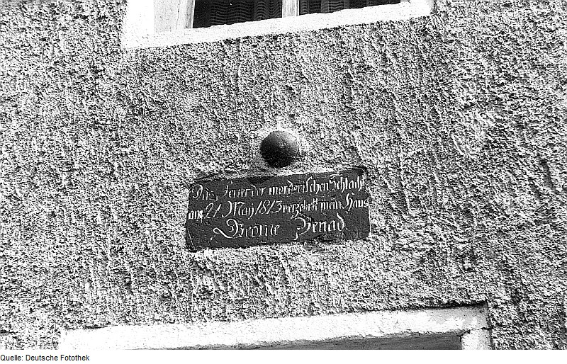 Original image description from the Deutsche Fotothek Kubschütz-Purschwitz. Ehem. Gutsmühle, Gedenktafel Schlacht vom 21.5.1813 betr.